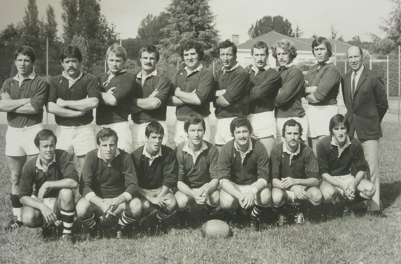 Equipe de Fumel 1976